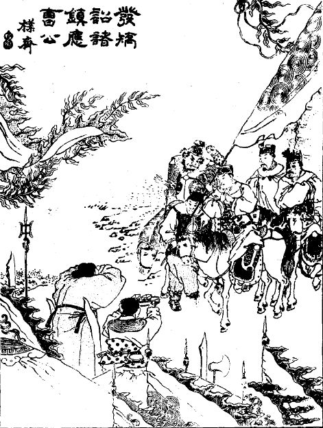 《三國演義》對於「發矯詔諸鎮應曹公」的想像圖